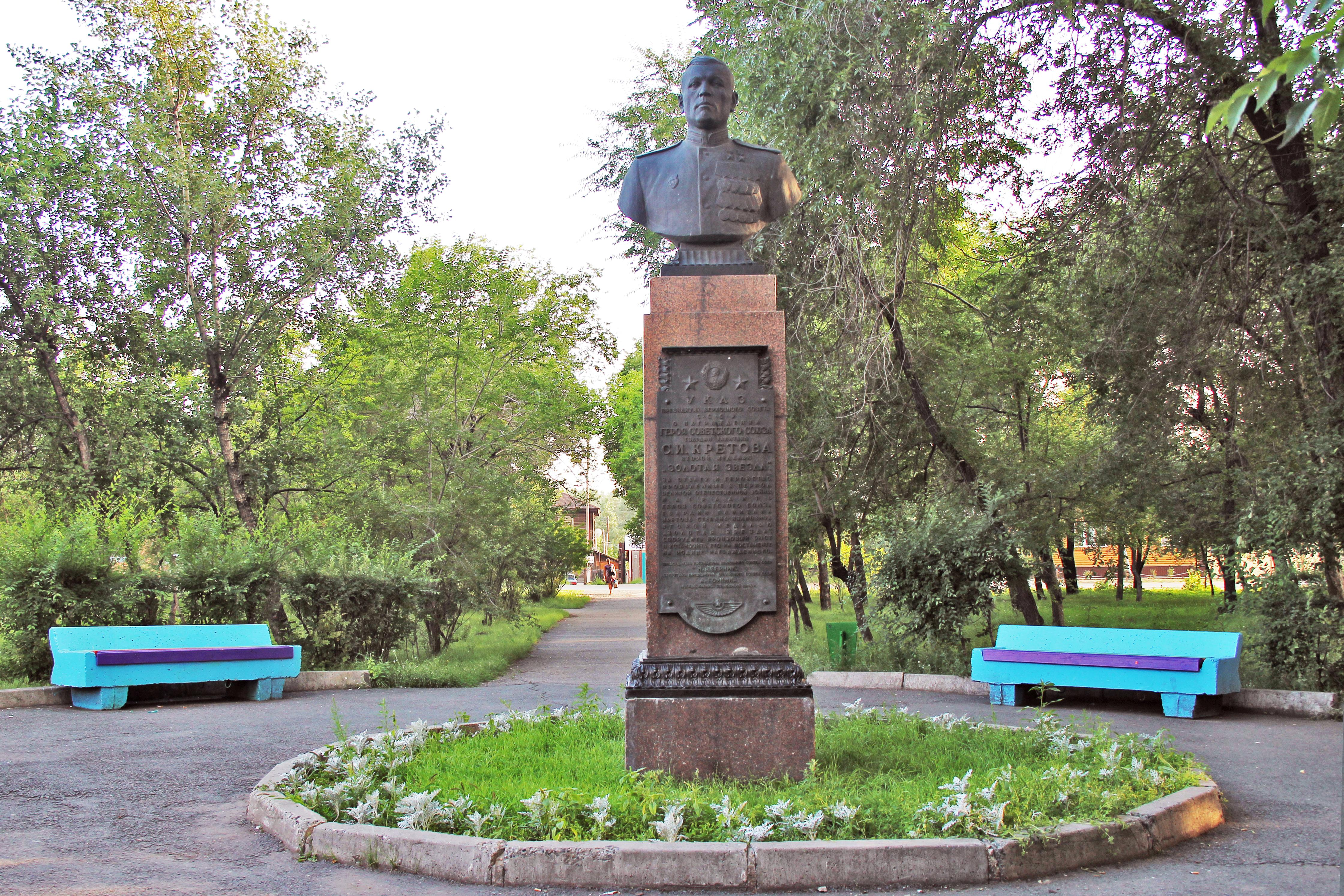 С. И. Кретов Герой Советского Союза. ( 1919 - 1975 гг.) Награждён двумя орденами Ленина (31.12.1942, 13.03.1944), двумя орденами Красного Знамени (23.12.1941, 14.11.1942), орденом Красной Звезды (1954), медалями.